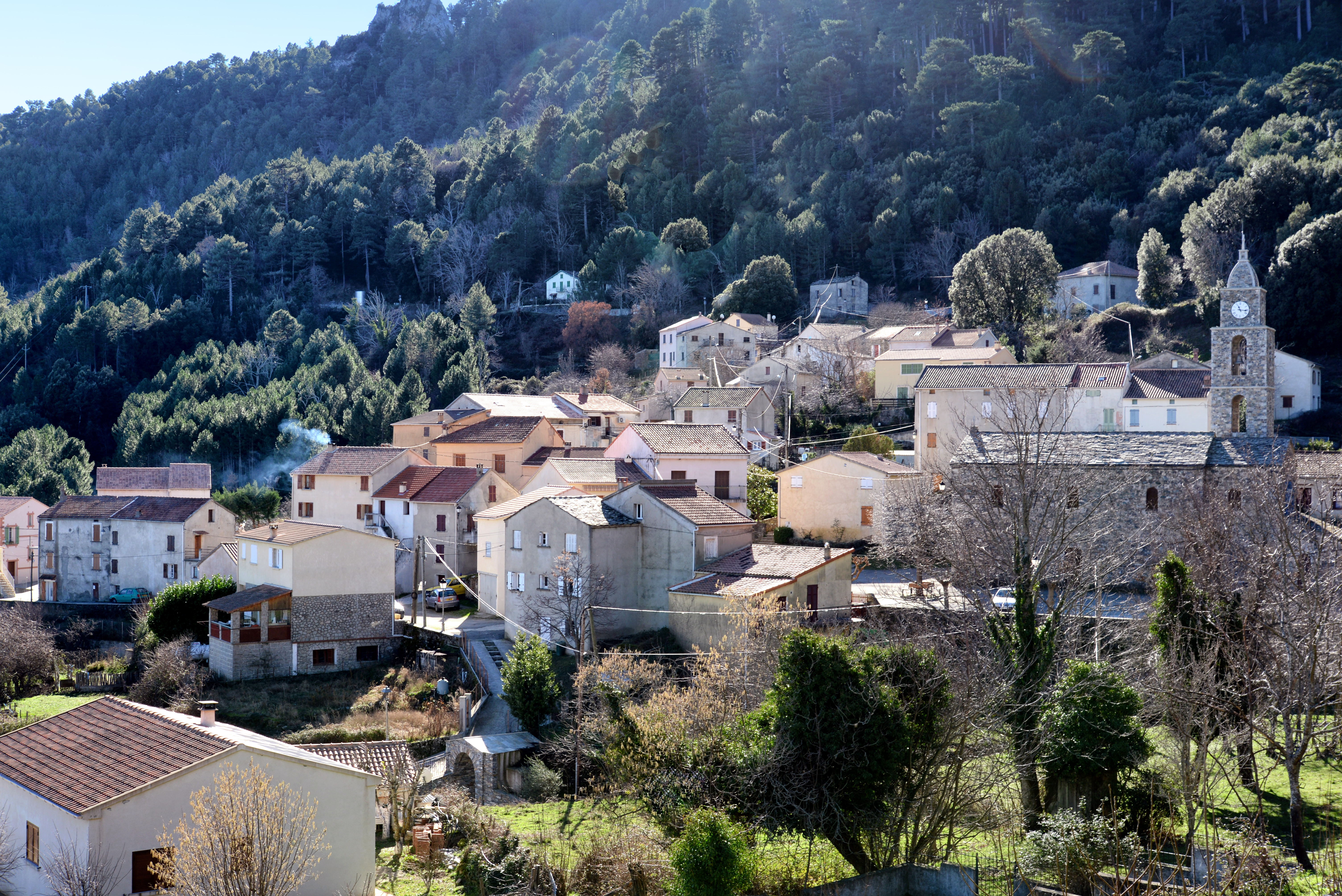 Rospigliani, Rogna (Corse) - Vue du village